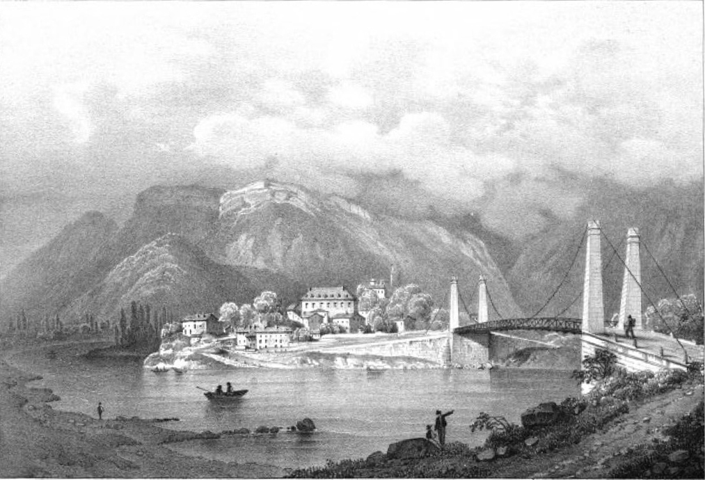 Album du Dauphiné - tome IV, litographie de St Gervais (Isère)